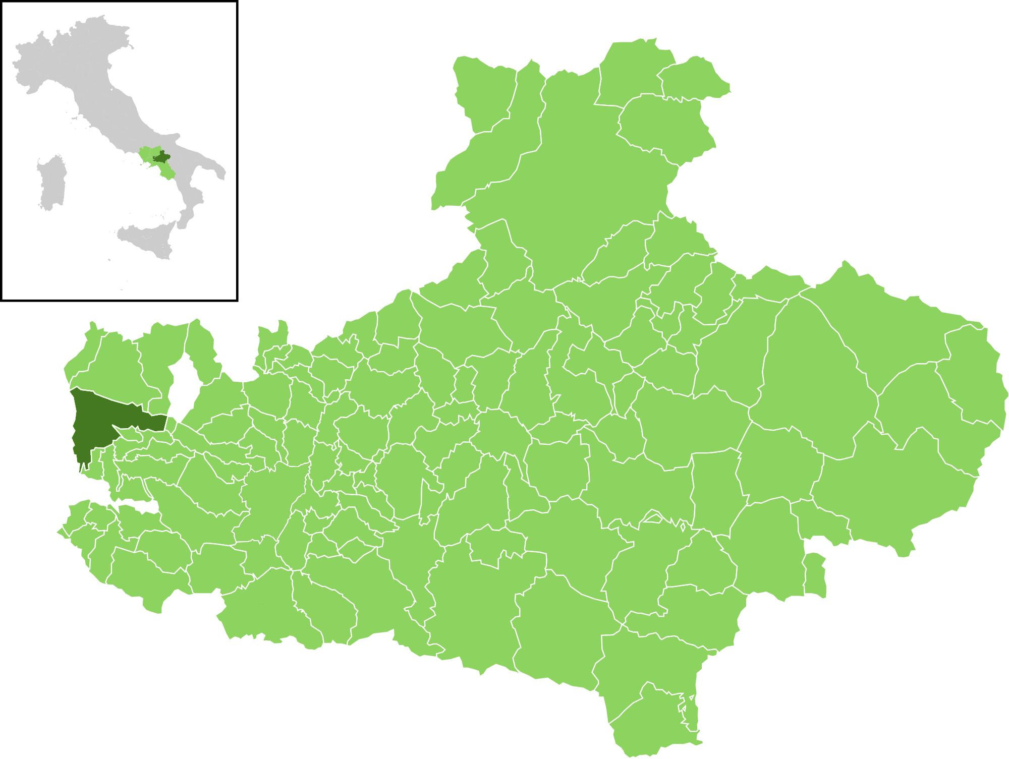 Il comune all'interno della provincia di Avellino